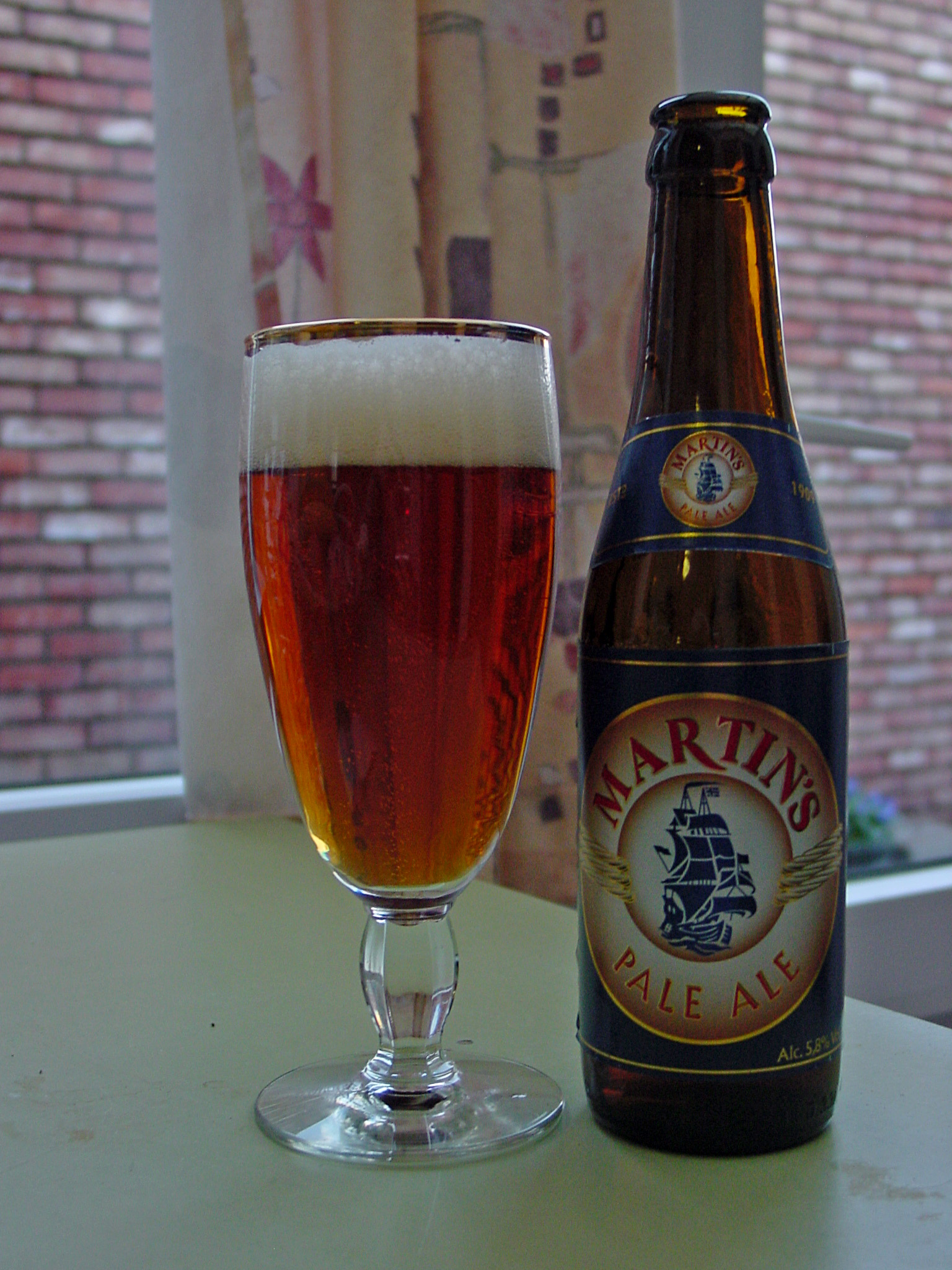 John Martin's Pale Ale etiket 2009